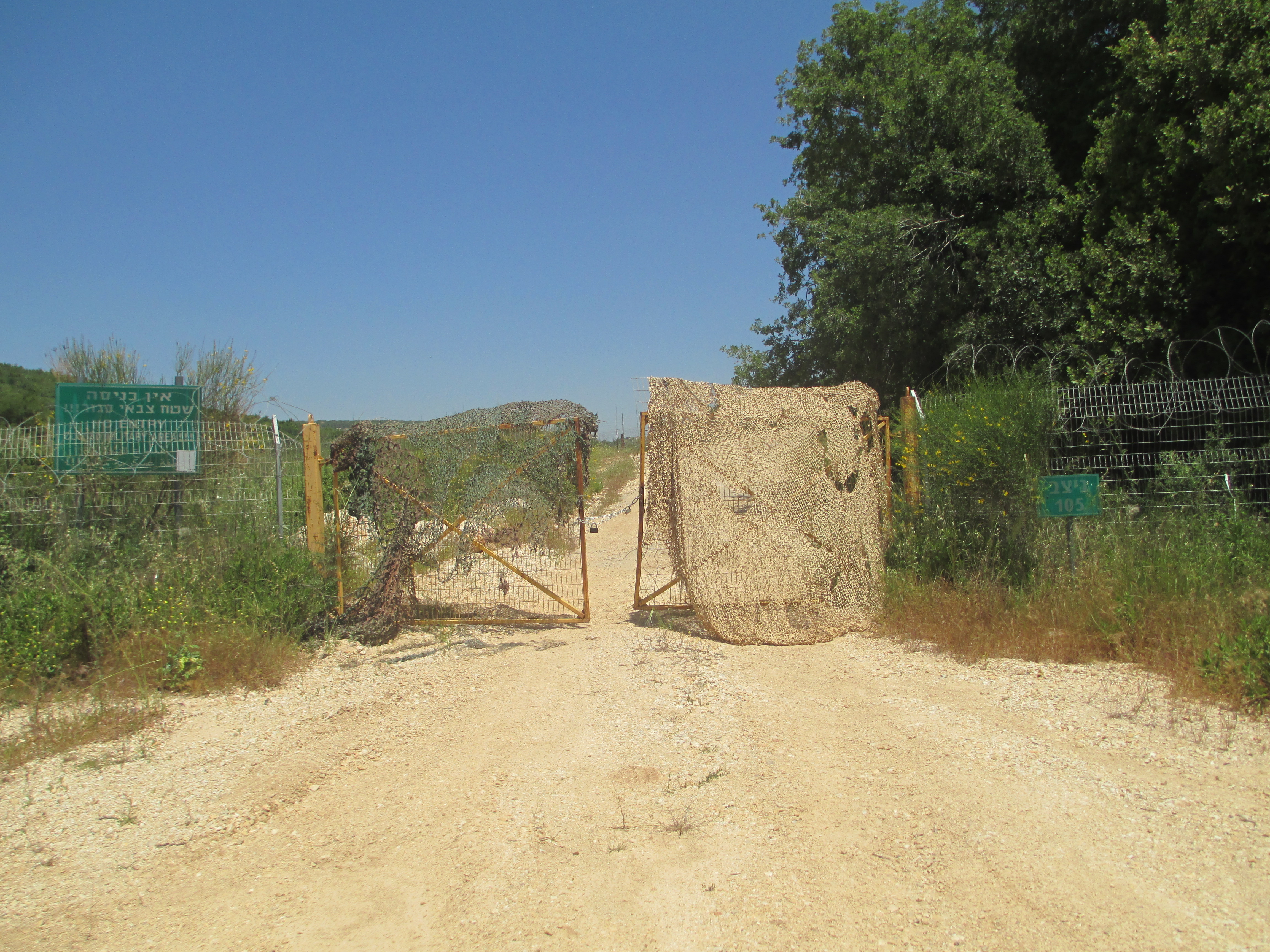 נקודה 105 על גבול לבנון בה אירעה התקפת חיזבאללה וחטיפת רגב וגולדווסר ב-12/7/06